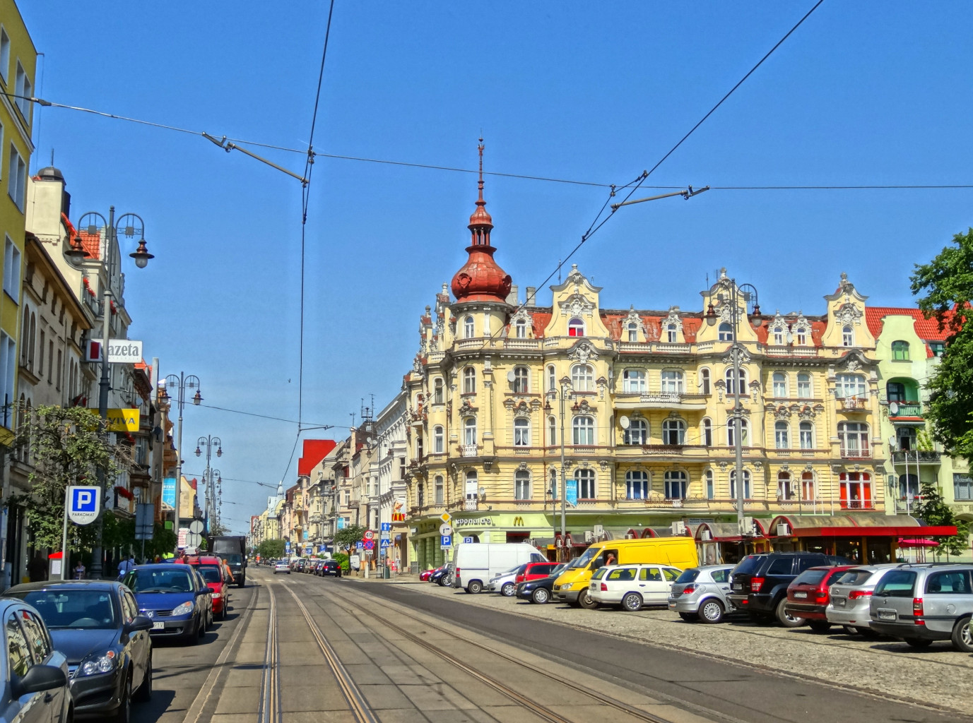 Ulica Gdańska w Bydgoszczy na odcinku między ul. Dworcową, a ul. Śniadeckich